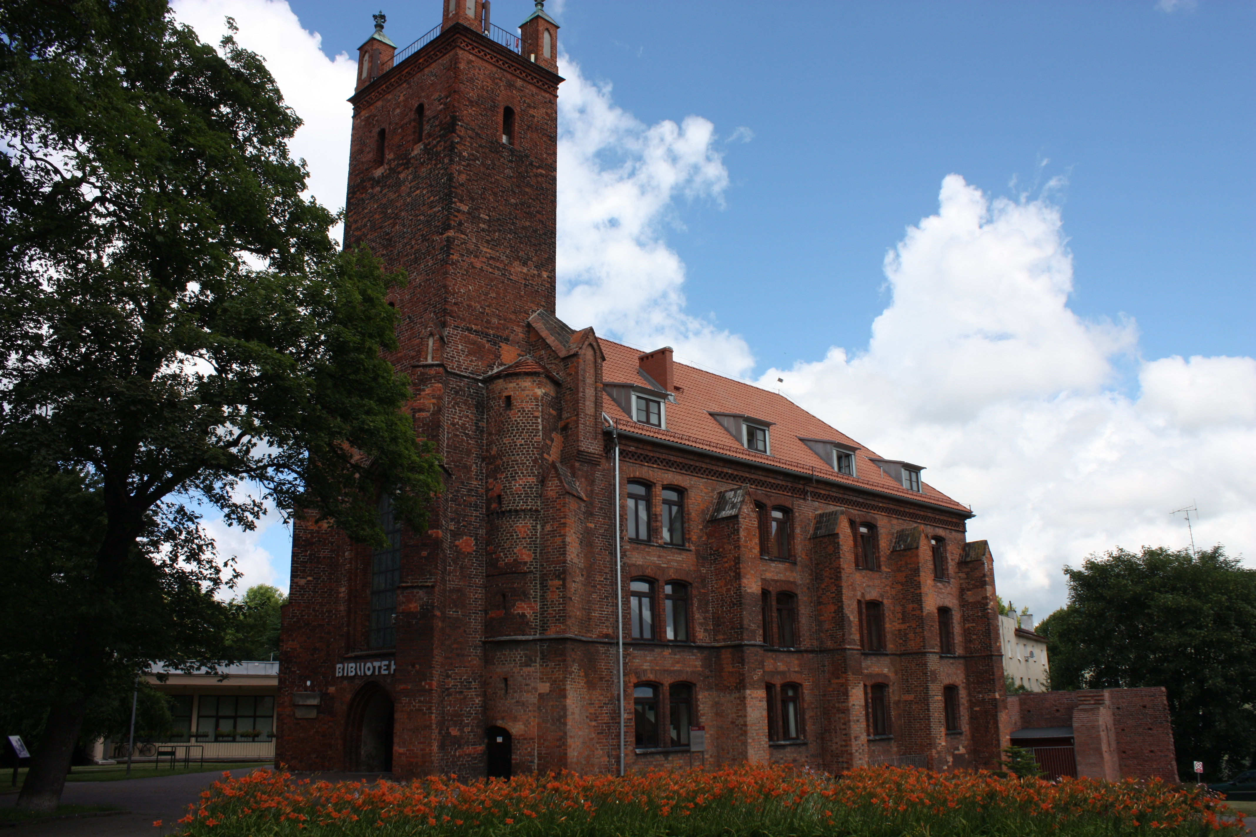 Słupsk, kościół klasztorny norbertanek, ob. Miejska Biblioteka Publiczna, 1 poł. XIV, 1771-1772, 1971